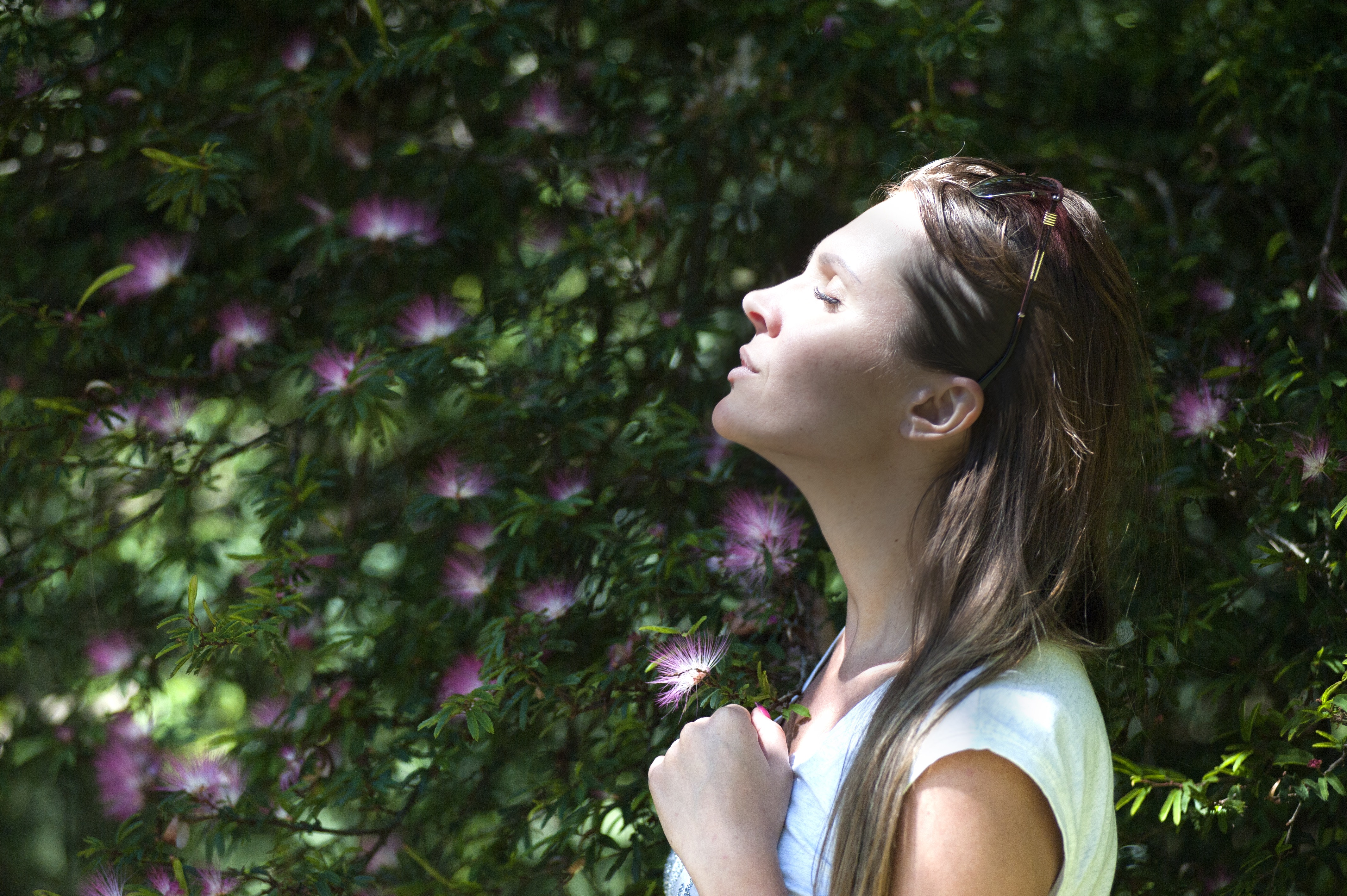 Sunce potiče fotostarenje kože